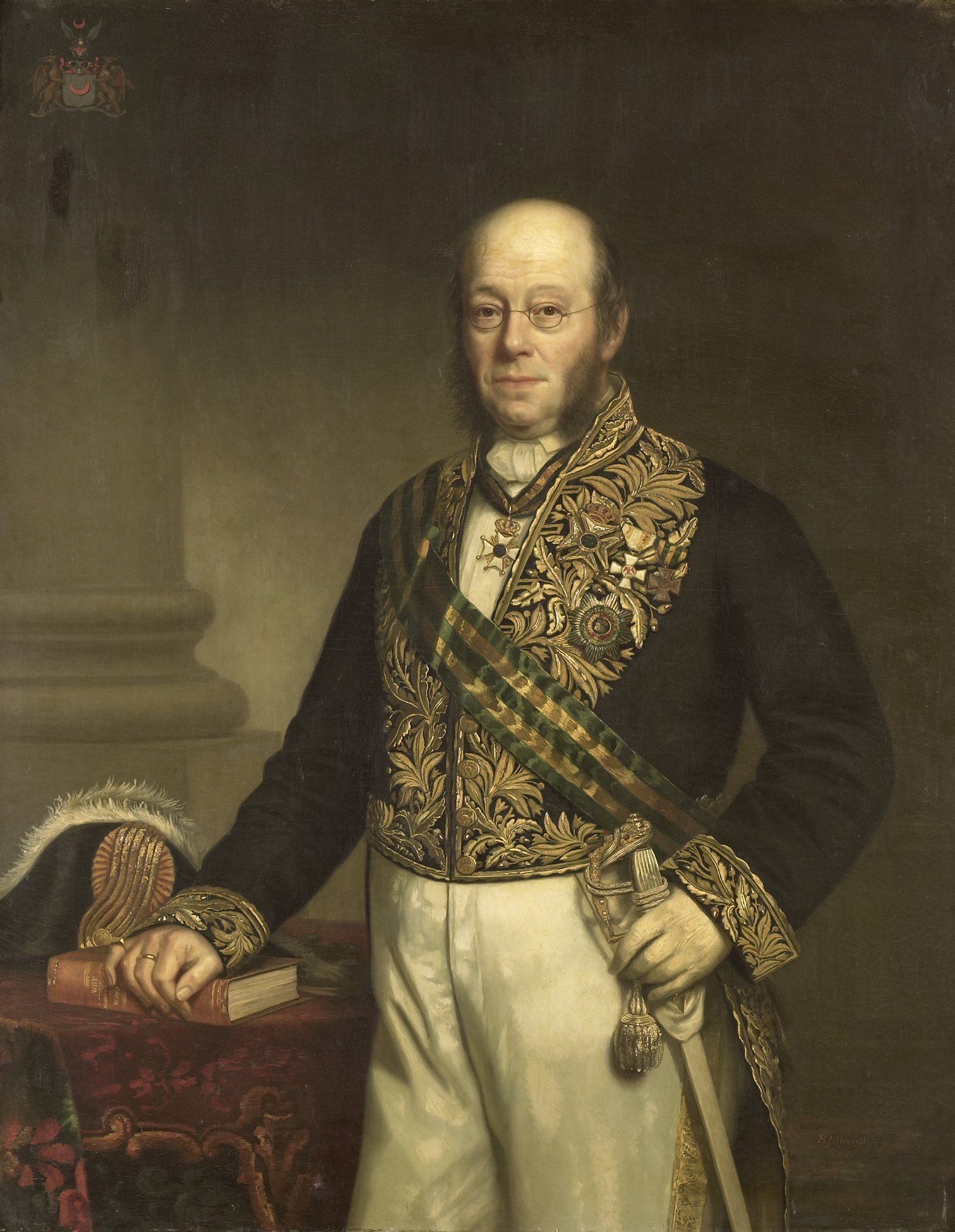 Portret van Ludolph Anne Jan Wilt Baron Sloet van de Beele (1806-90). Gouverneur-generaal (1861-66). Kniestuk, staande, iets naar links. De rechterhand rustend op een boek dat, bij de steek, op een een tafel ligt. De linkerhand op het gevest van zijn degen. Onderdeel van een reeks van portretten van de gouverneurs-generaal van het voormalige Nederlands Oost-Indië. Collection: schilderijen; Gouverneurs-generaal serie